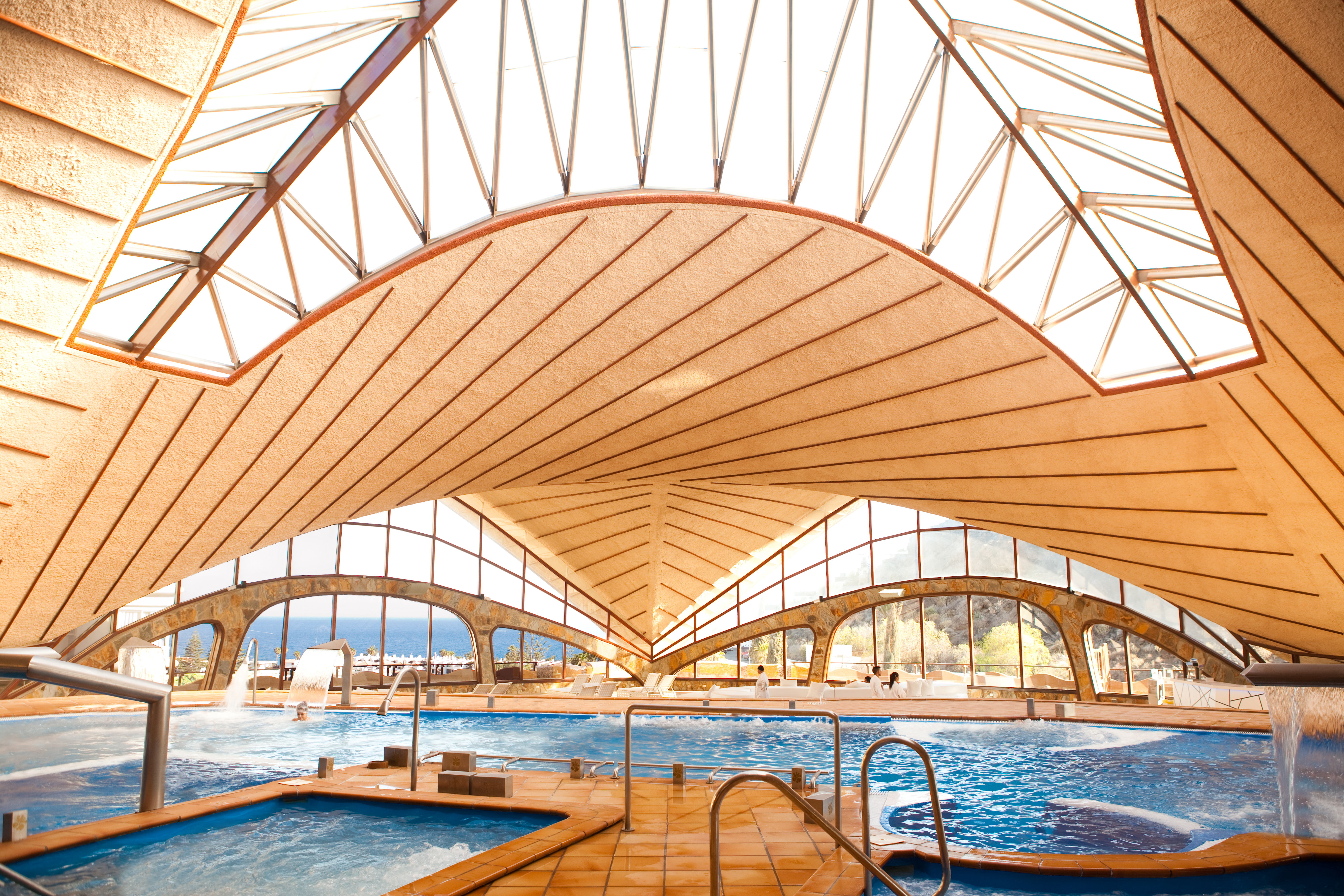 Thalasso más grande y completa de Europa. Centro pionero del Turismo de Salud en Las Islas Canarias. Thalasso Gloria Palace San Agustín